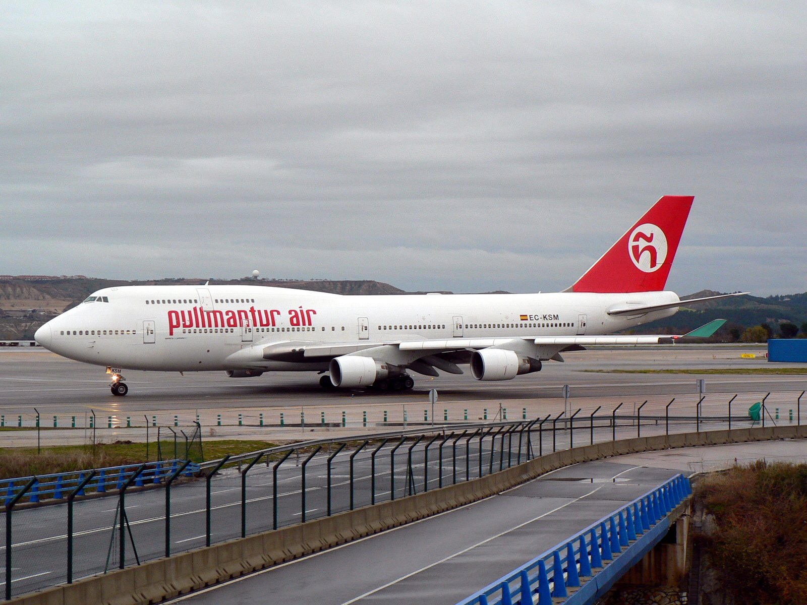 Boeing 747-412 (EC-KSM) de Air Pullmantur en el aeropuerto Adolfo Suárez Madrid-Barajas.